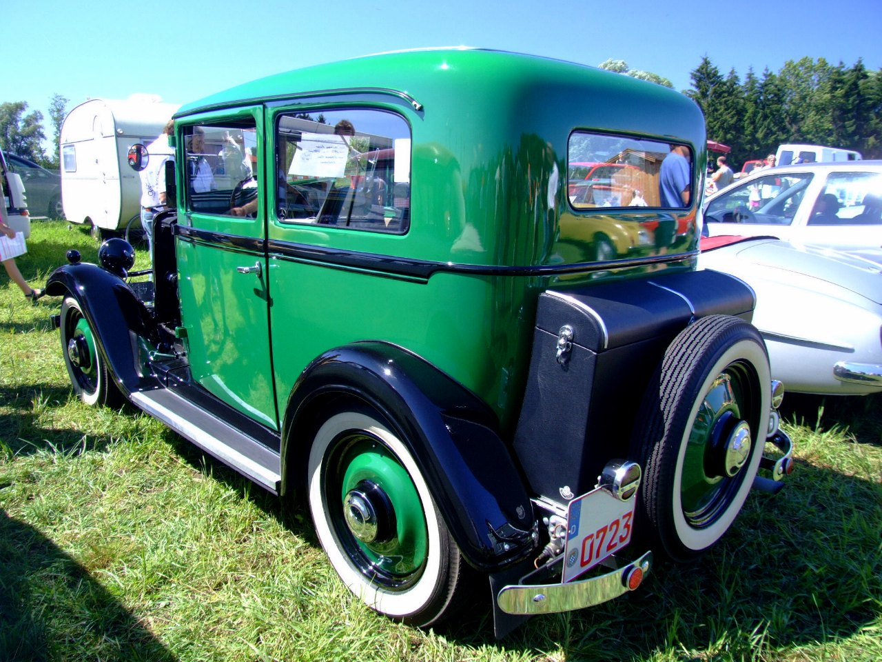 Hanomag Kurier 1089ccm 23PS 1935